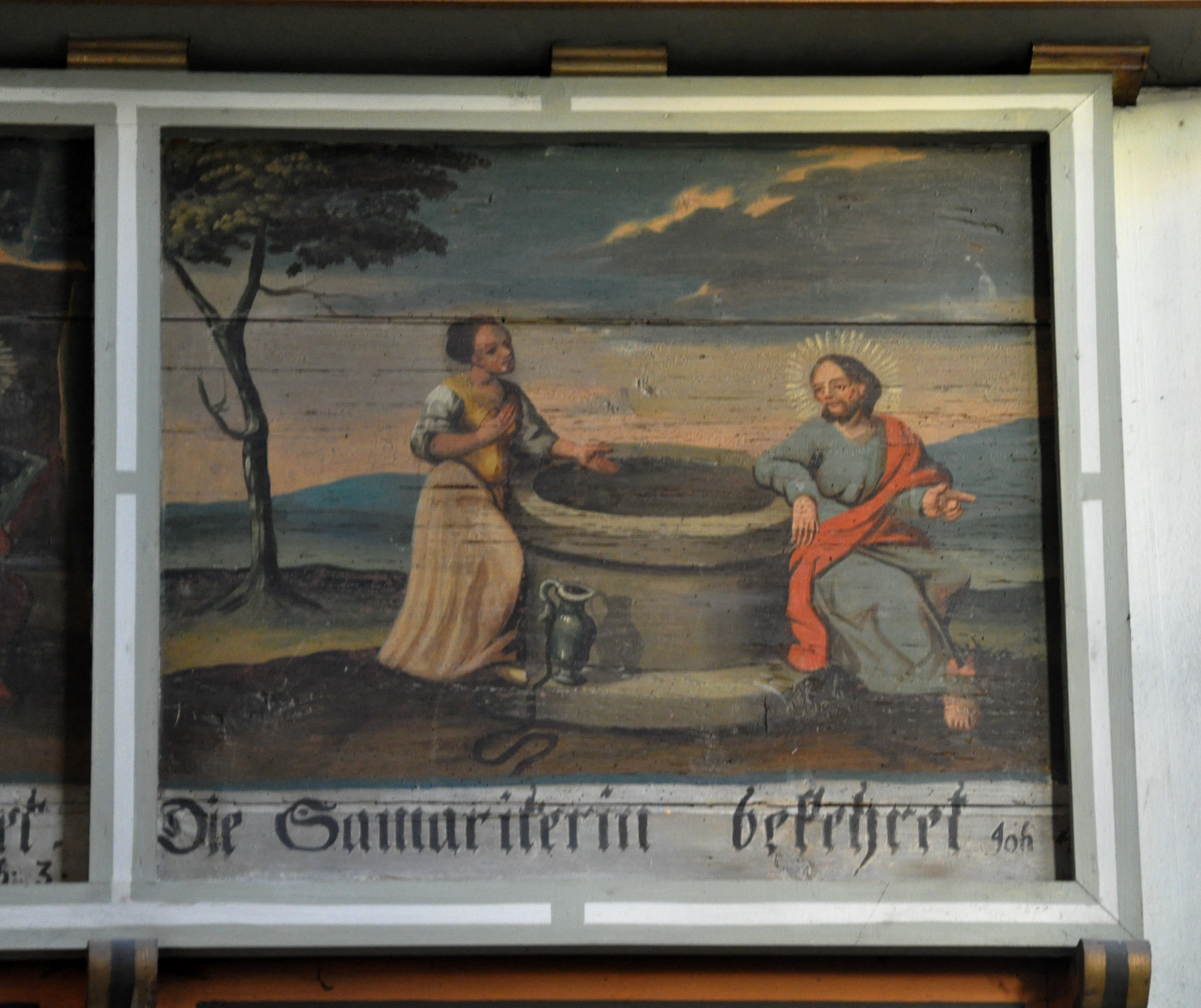 Marktbreit, Evangelisch-lutherische Stadtpfarrkirche St. Nikolai, „Armenbibel“ (Emporengemälde), Bild Christus und die Samariterin am Brunnen; 1777, von Maler Johannes Völck jun. aus Ochsenfurt.